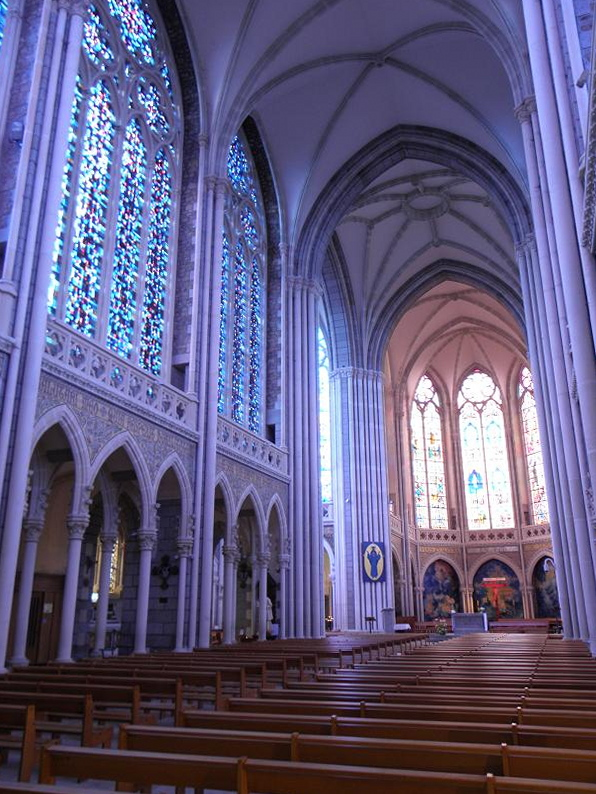 Intérieur de la basilique Notre-Dame-d'Espérance de Pontmain (53). Nef principale. Costale ouest.